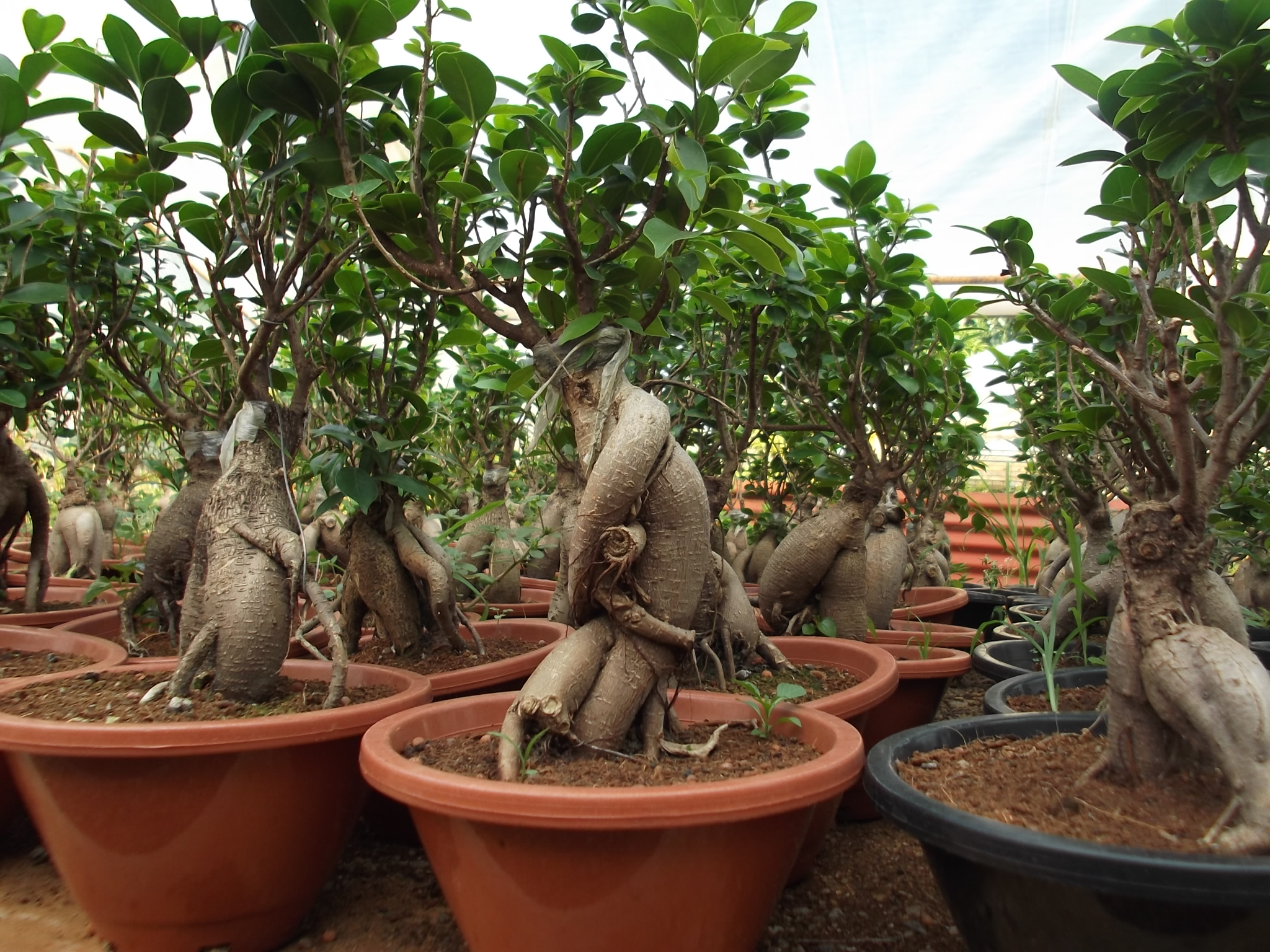 ബോൺസായ്